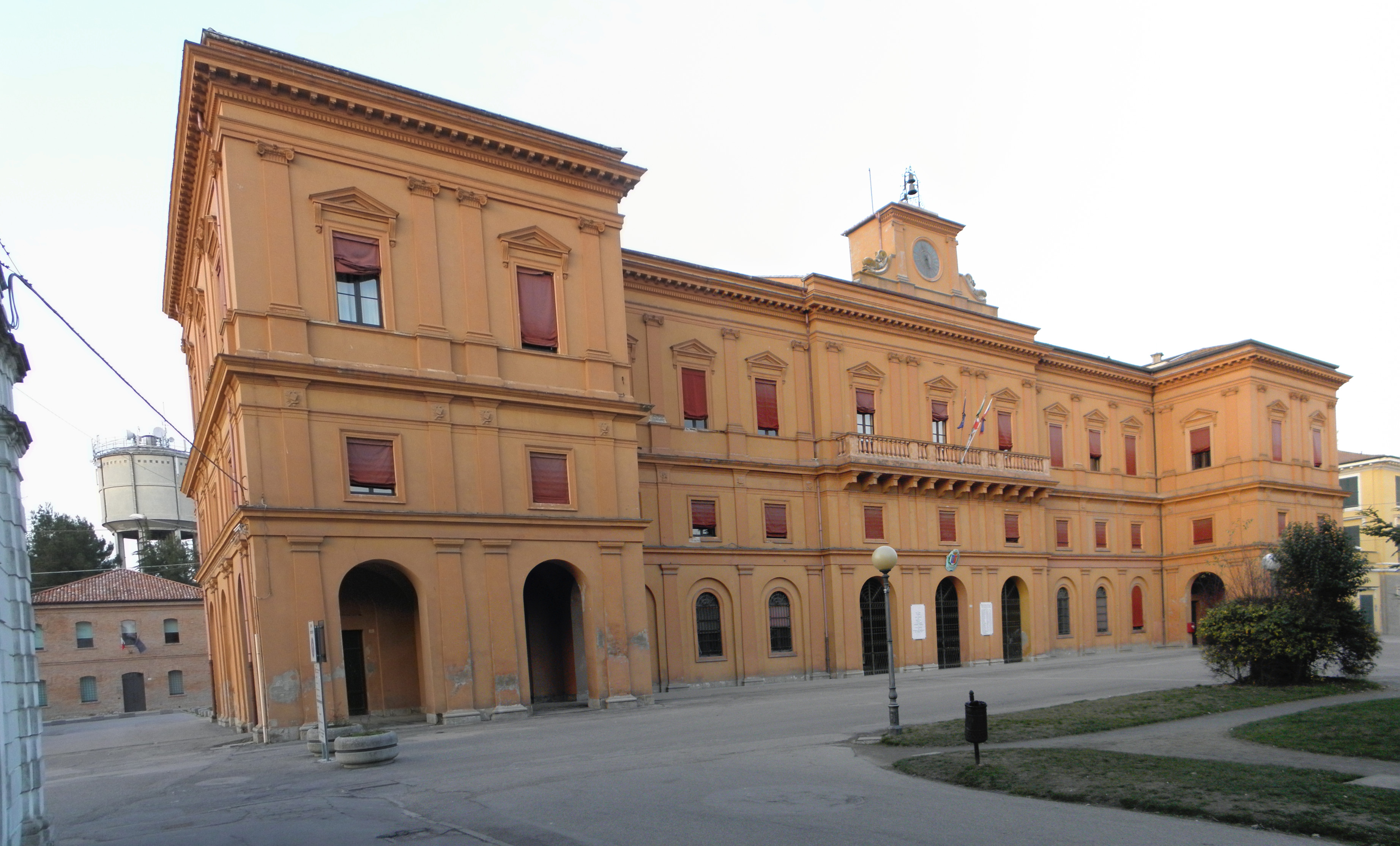 Copparo: il palazzo municipale che ingloba le strutture della precedente Delizia estense.